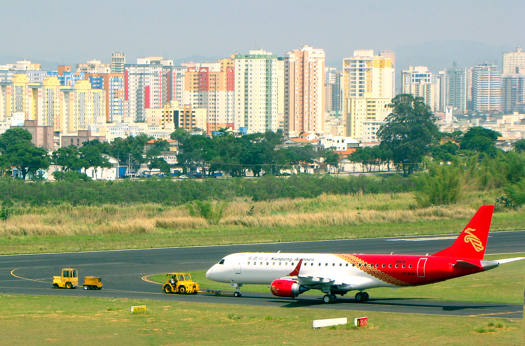 aeroporto de são jose dos campos com a cidade ao fundo